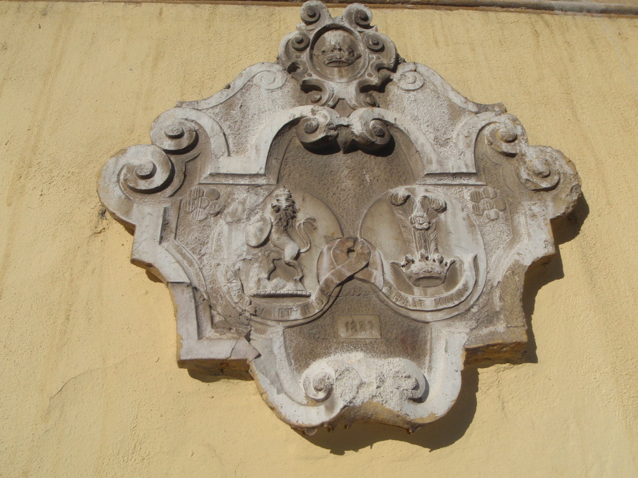 Peresznye kastély címer2015 This is a photo of a monument in Hungary, Identifier: 9254